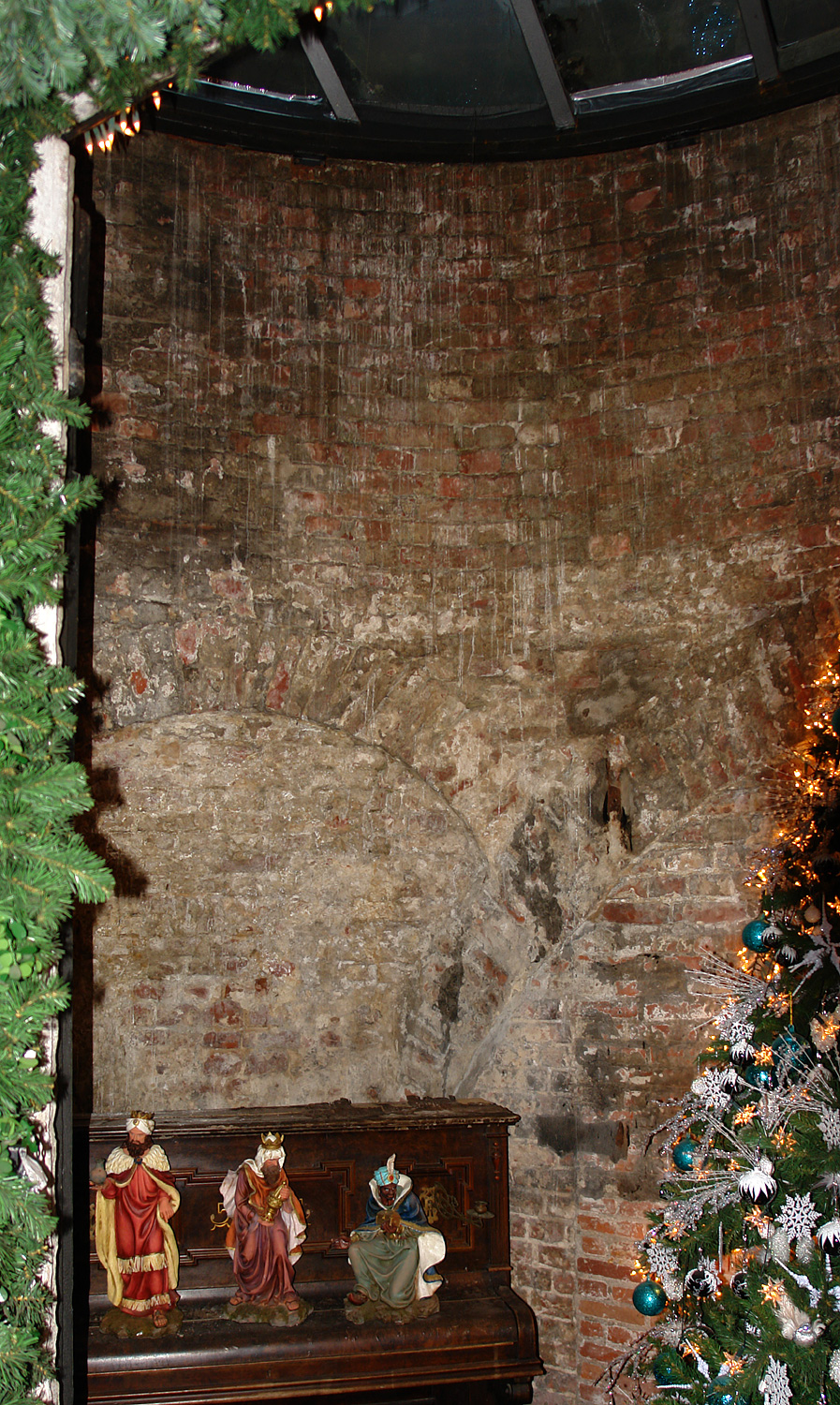 Bremen, Schnoor: Reststücke der Bremer Stadtmauer (13.Jh.) im 400 Jahre alten Speicherhaus